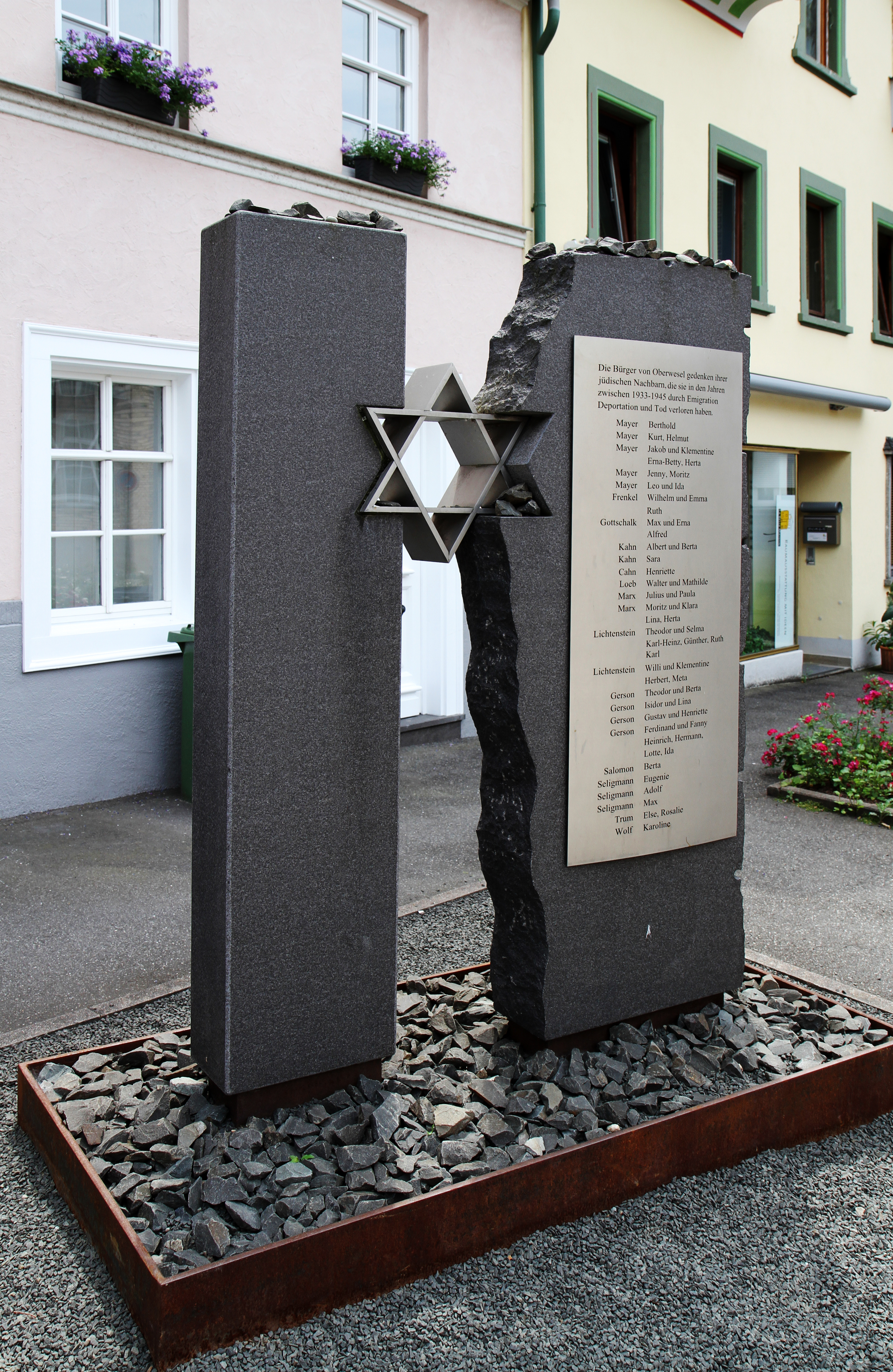 Denkmal für die jüdischen Opfer des Nationalsozialismus in Oberwesel.